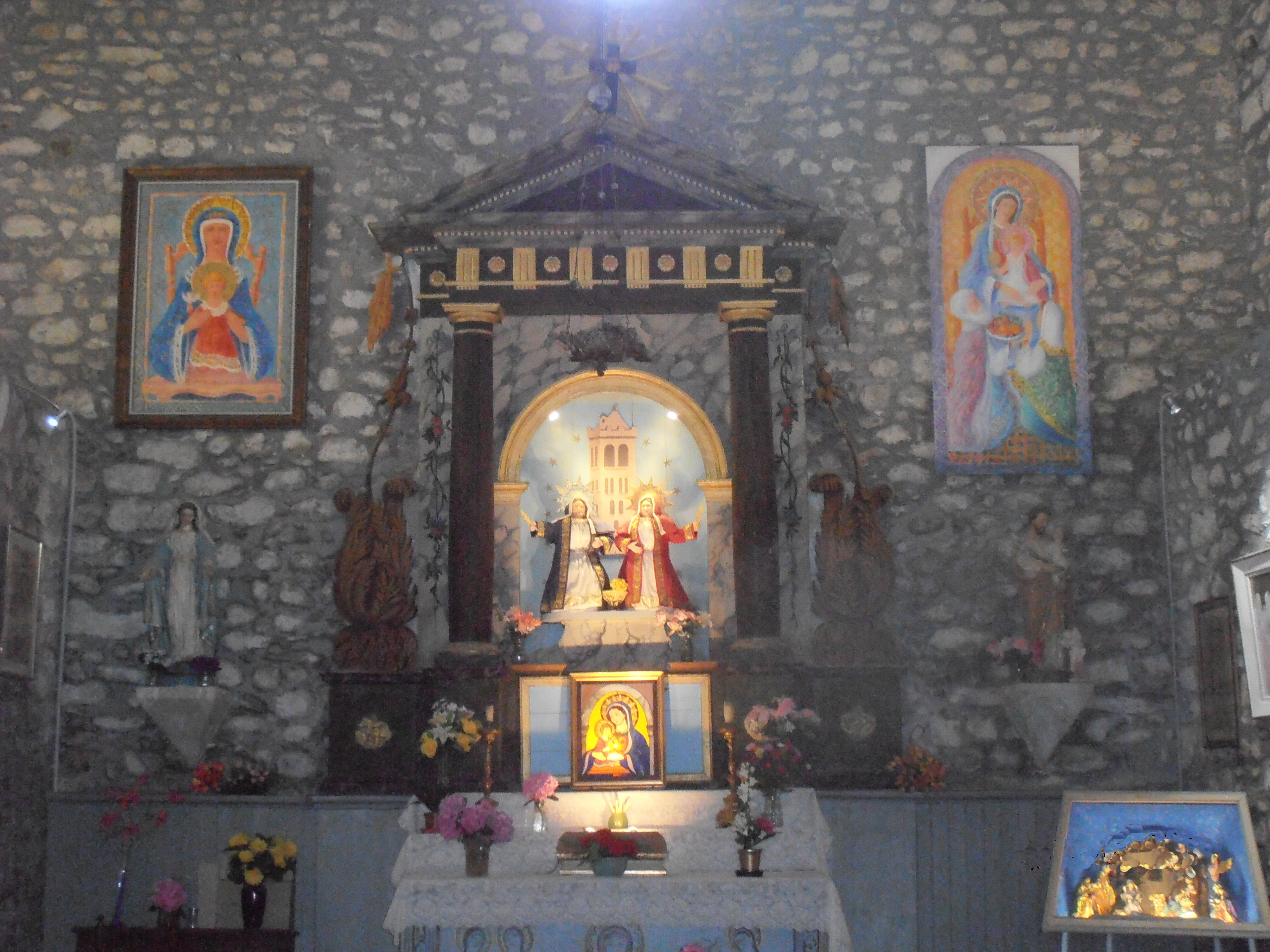 Altar major de l'ermita de Santa Justa i Rufina de Prats de Molló la Presta